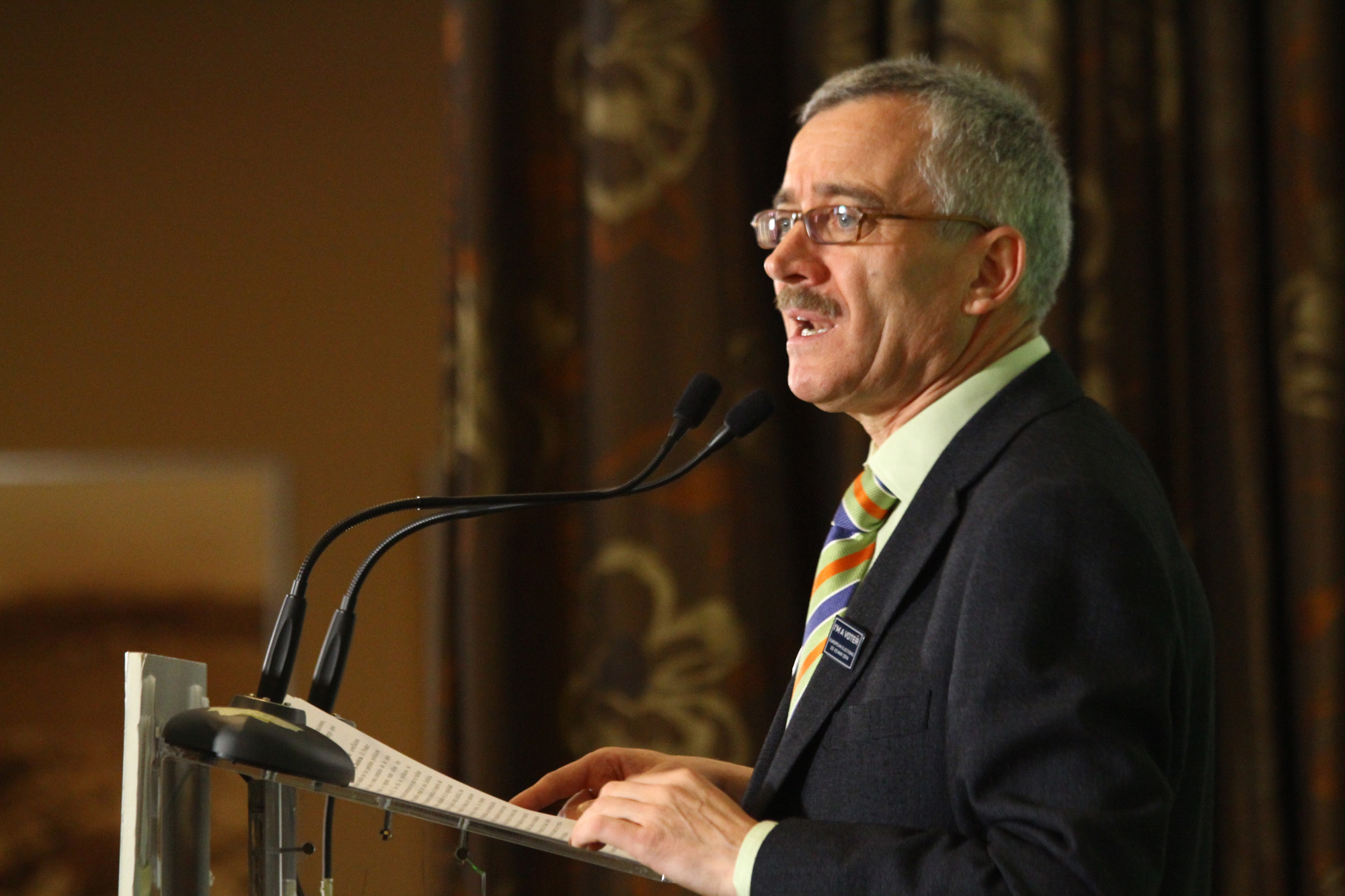 Acto de presentación del partido de centro-derecha Vox en Las Coruña. Intervinieron Francisco Javier Fernández Tarrío, coordinador de Vox en La Coruña; José Antonio Ortega Lara y el secretario general de Vox, Santiago Abascal.